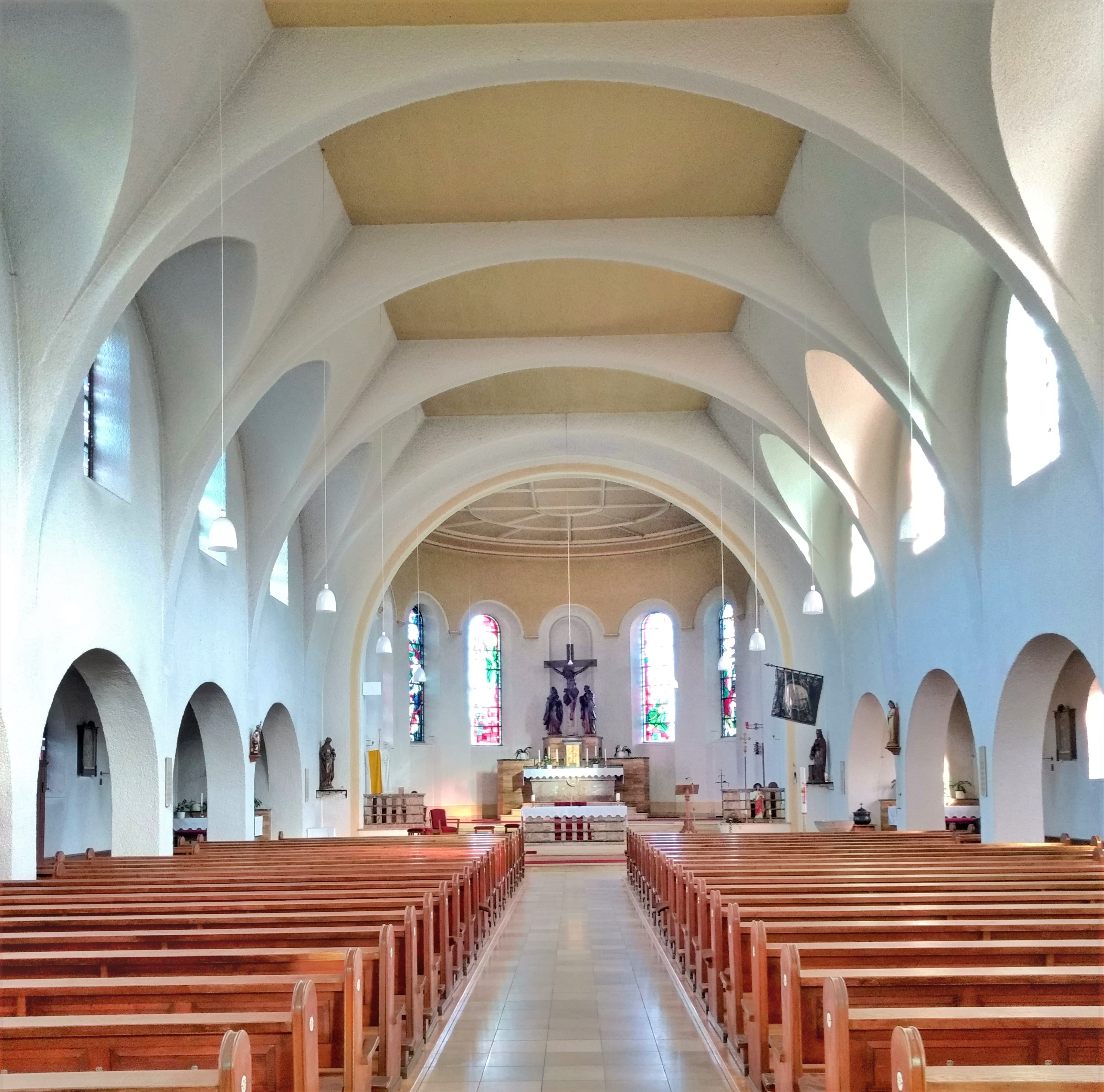 St. Matthias (Altforweiler)